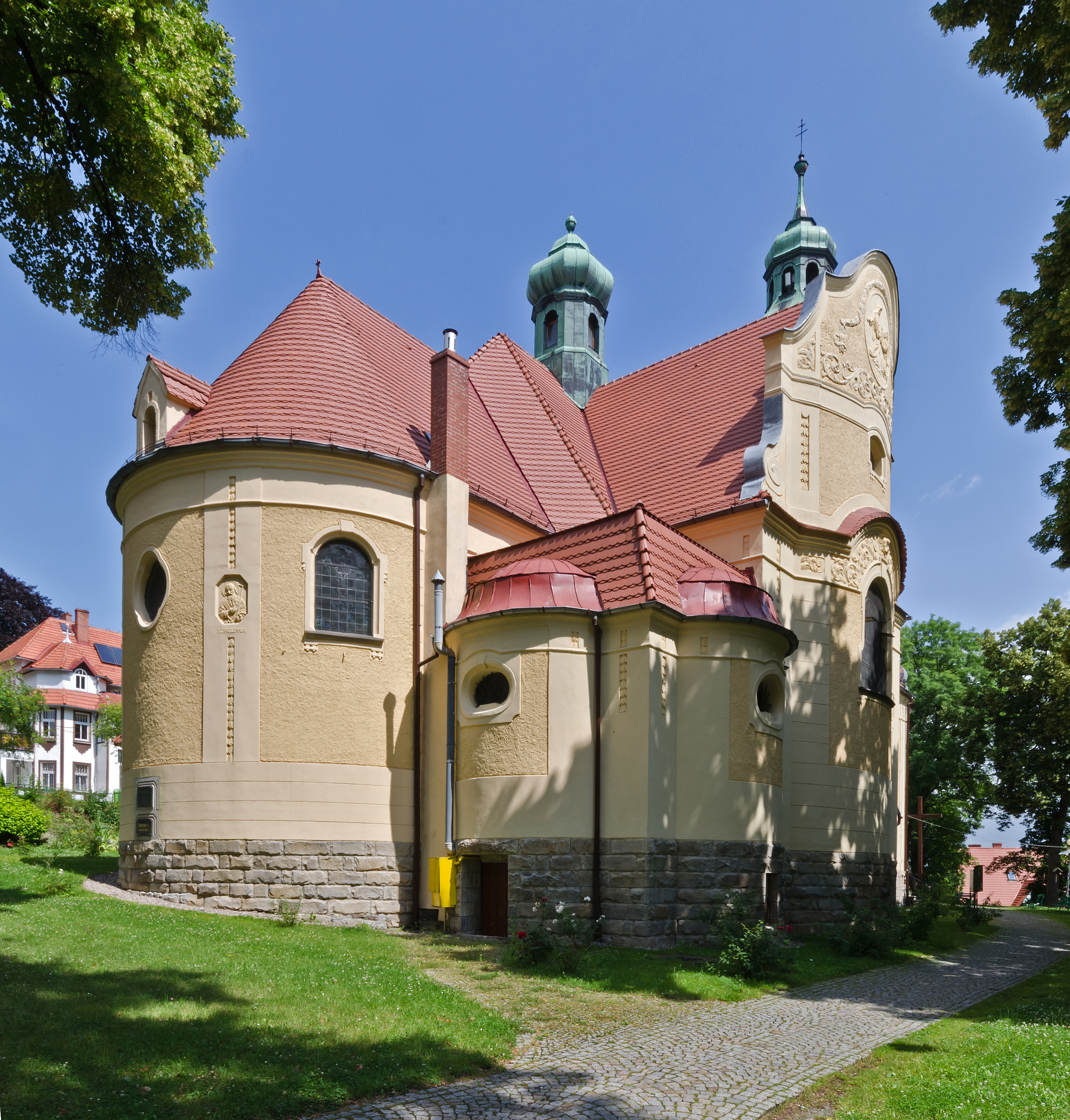 Polanica-Zdrój, kościół par. p.w. Wniebowzięcia NMP, 1910